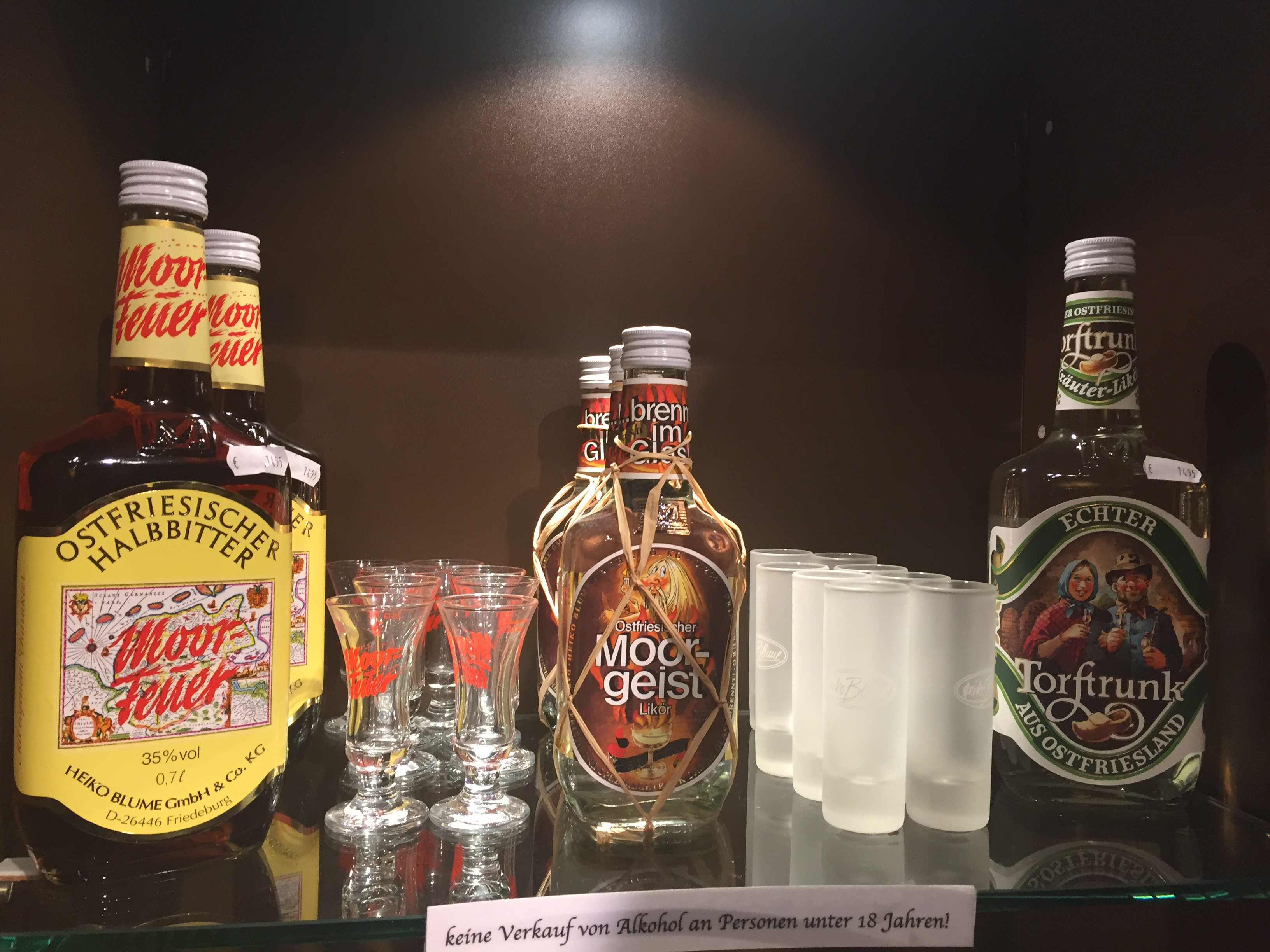 alkoholische Spezialitäten aus Ostfriesland